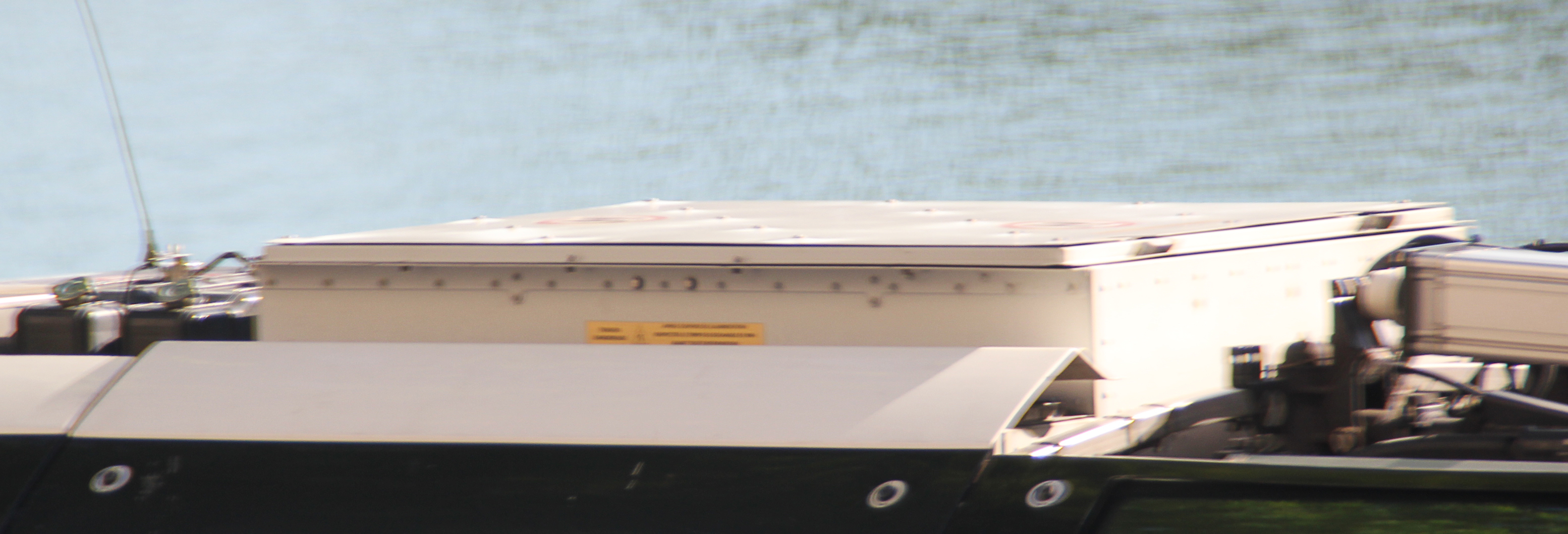 Irisbus Cristalis ETB12 des Transports en Commun de Lyon : détail du coffre de toit.